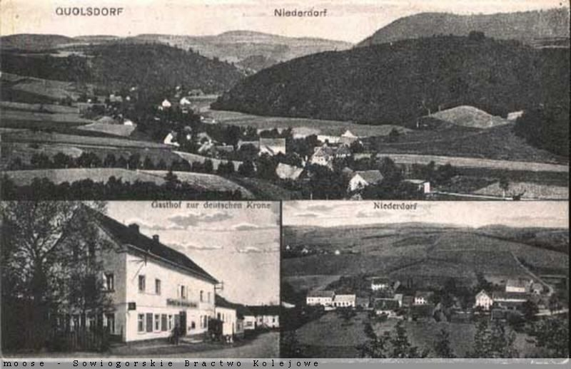 Chwaliszów, widok ogólny, aktualnie Chwaliszów Górny